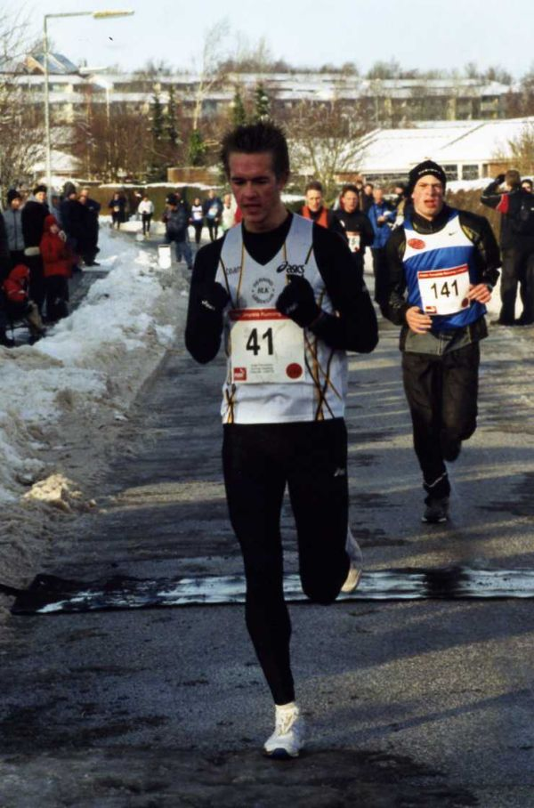 Jesper Faurschou ved 10 km landevej under vinterturneringen